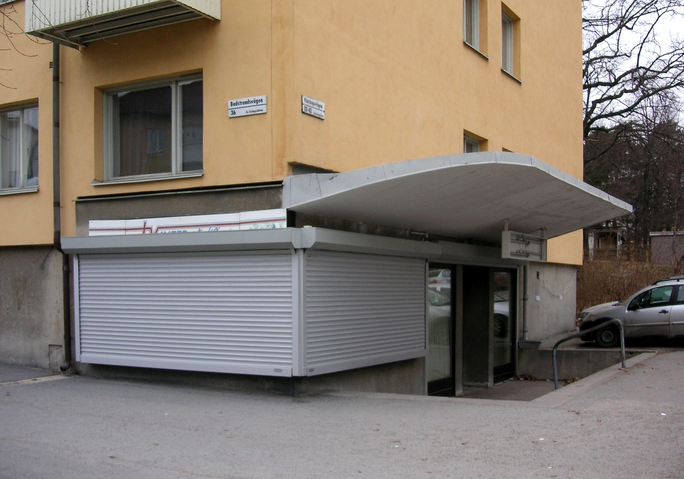 Före detta Biograf Orkanen på Stora Essingen